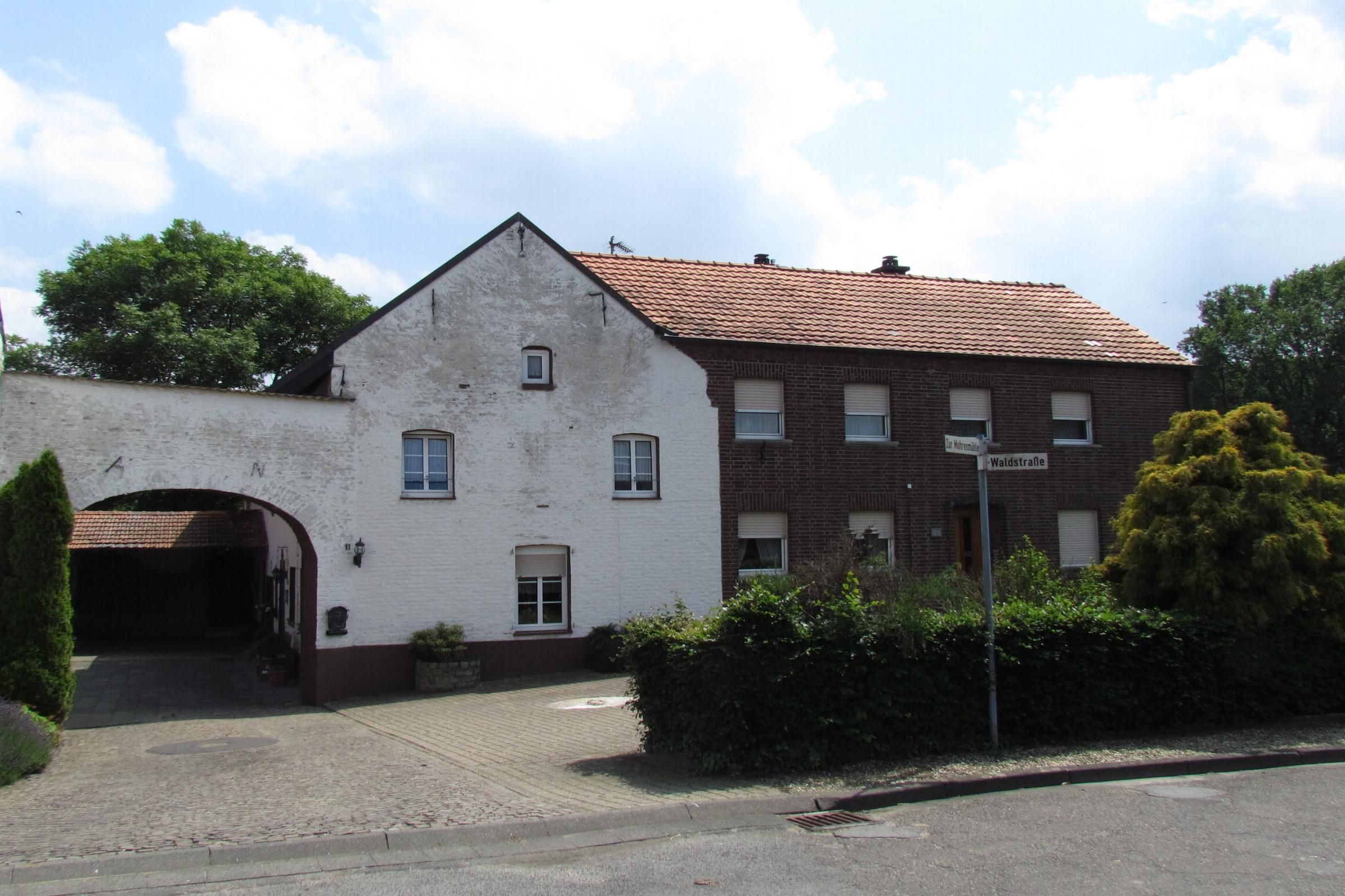 Mohrenmühle in Gangelt